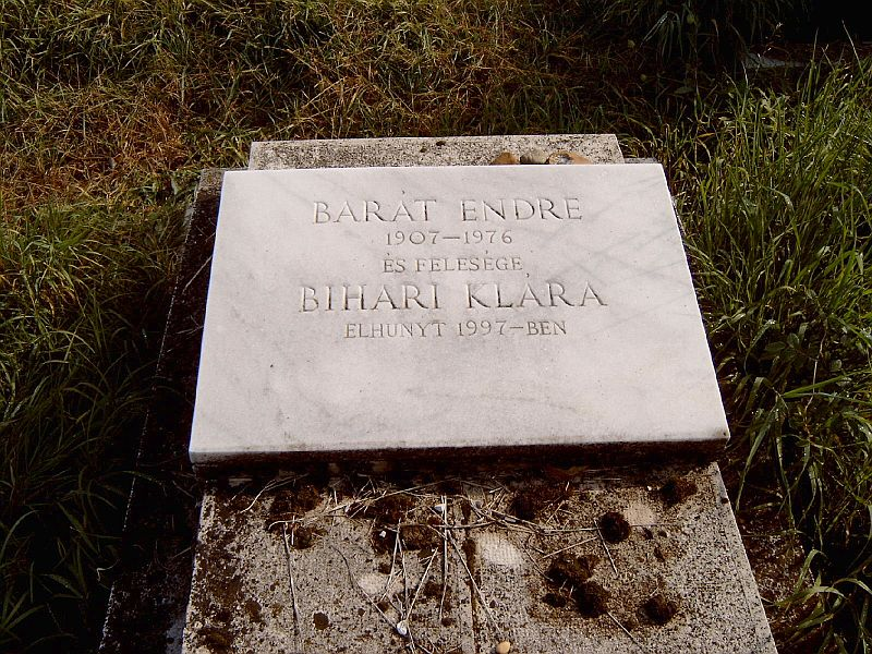 Barát Endre (Nagykáta, 1907. április 24. – Budapest, 1976. március 17.) író, újságíró és Bihari Klára [Barát Endréné] (Nagyszalonta, 1917. december 8. - Budapest, 1997. június 6.) író, költő sírja Budapesten. Kozma utcai izraelita temető: 5B-8-22